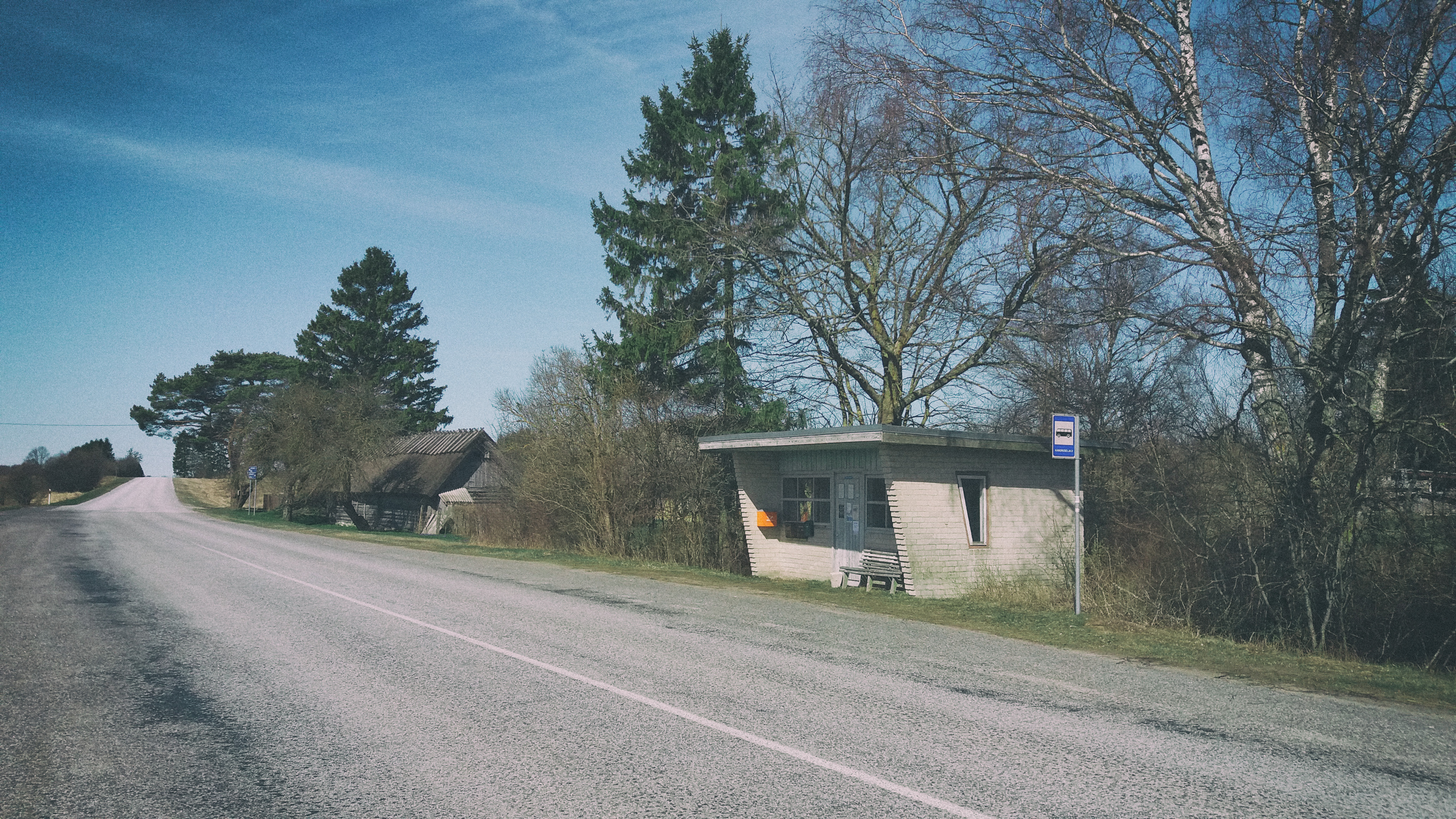 Muinsuskaitsealune bussiootepaviljon Kangrusselja külas